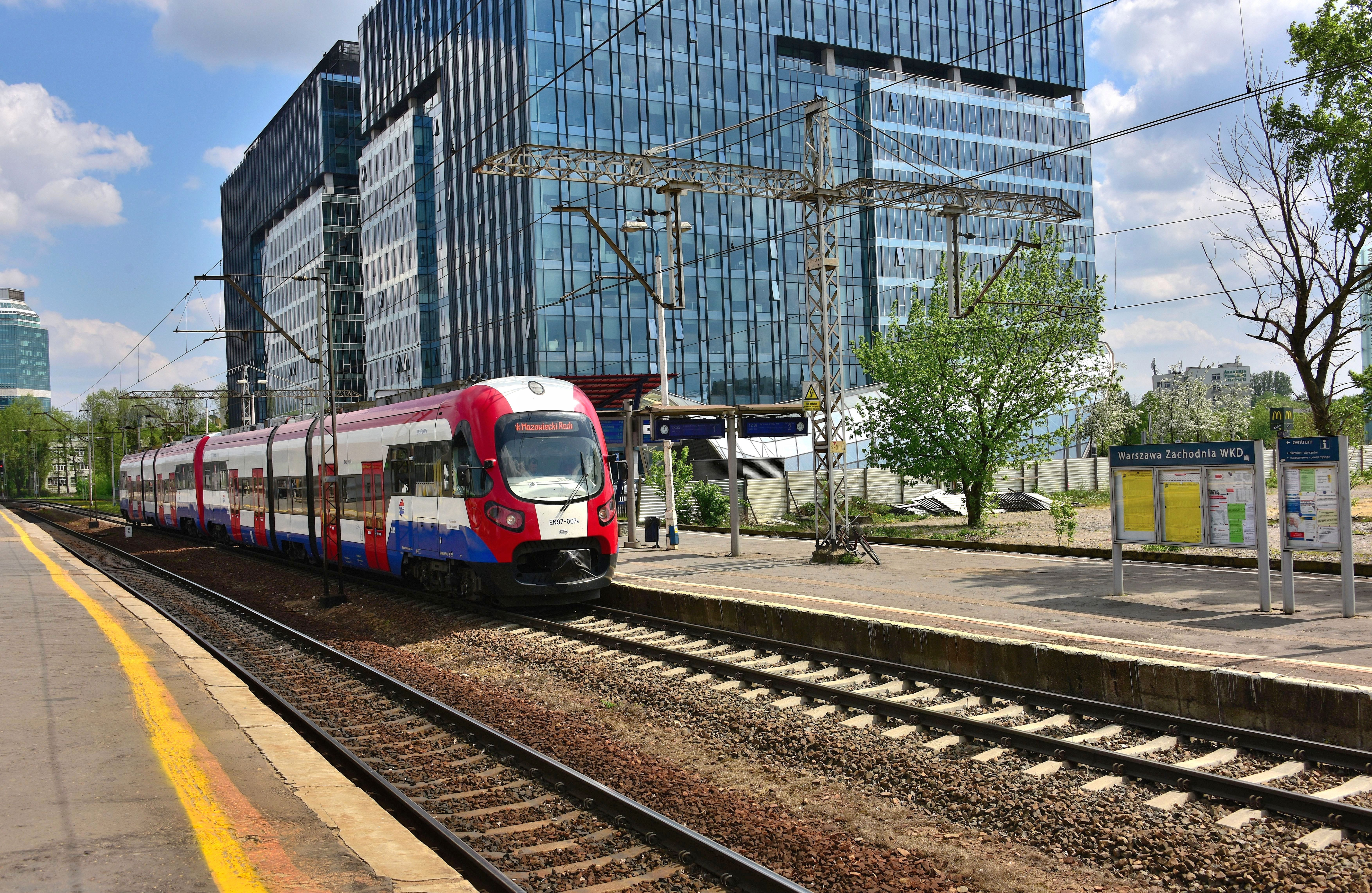 Przystanek kolejowy Warszawa Zachodnia WKD